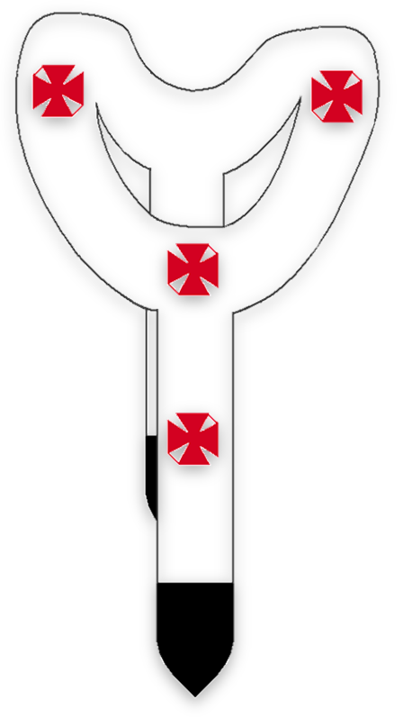 Paliusz papieża Franciszka